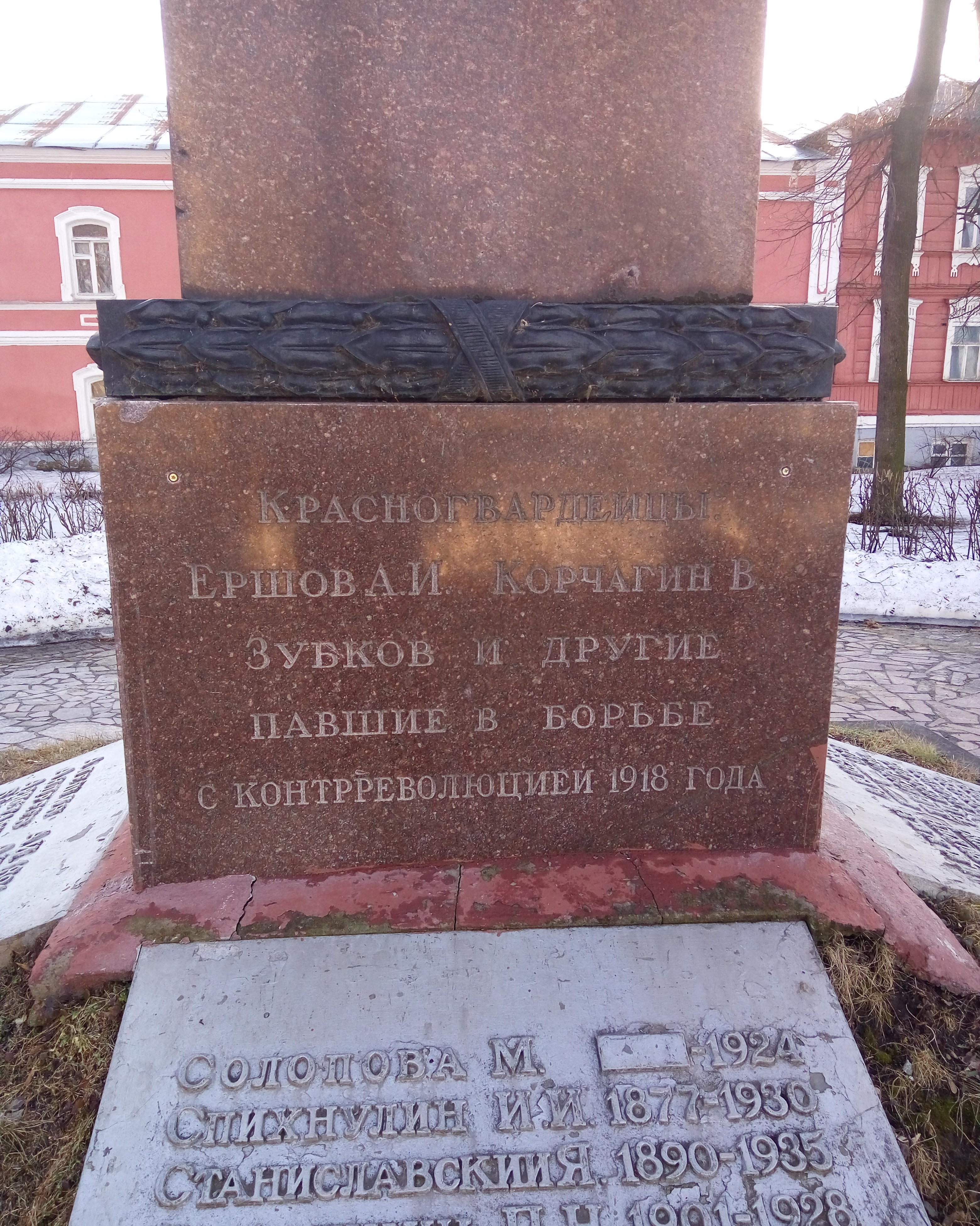 Стела героям гражданской войны 1917-1918 годов (Рязань), вид спереди